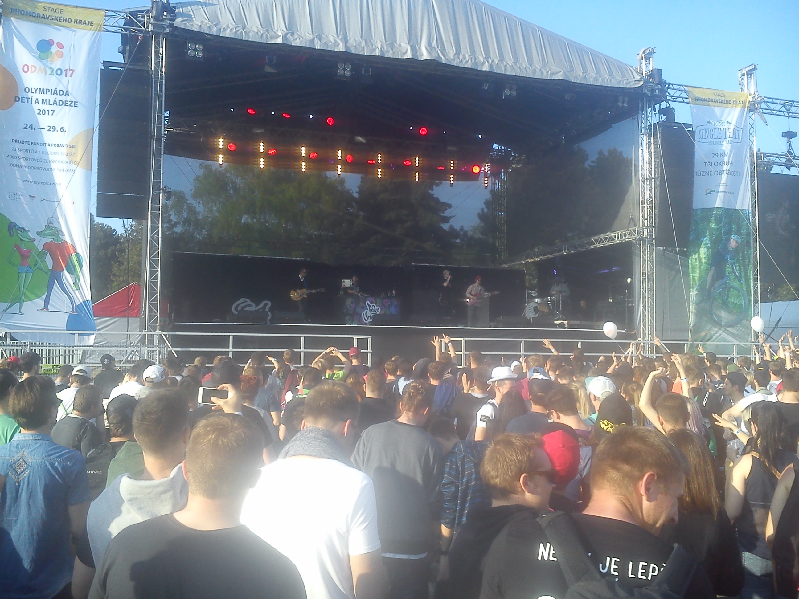 Prago Union, Brněnský Majáles 2017